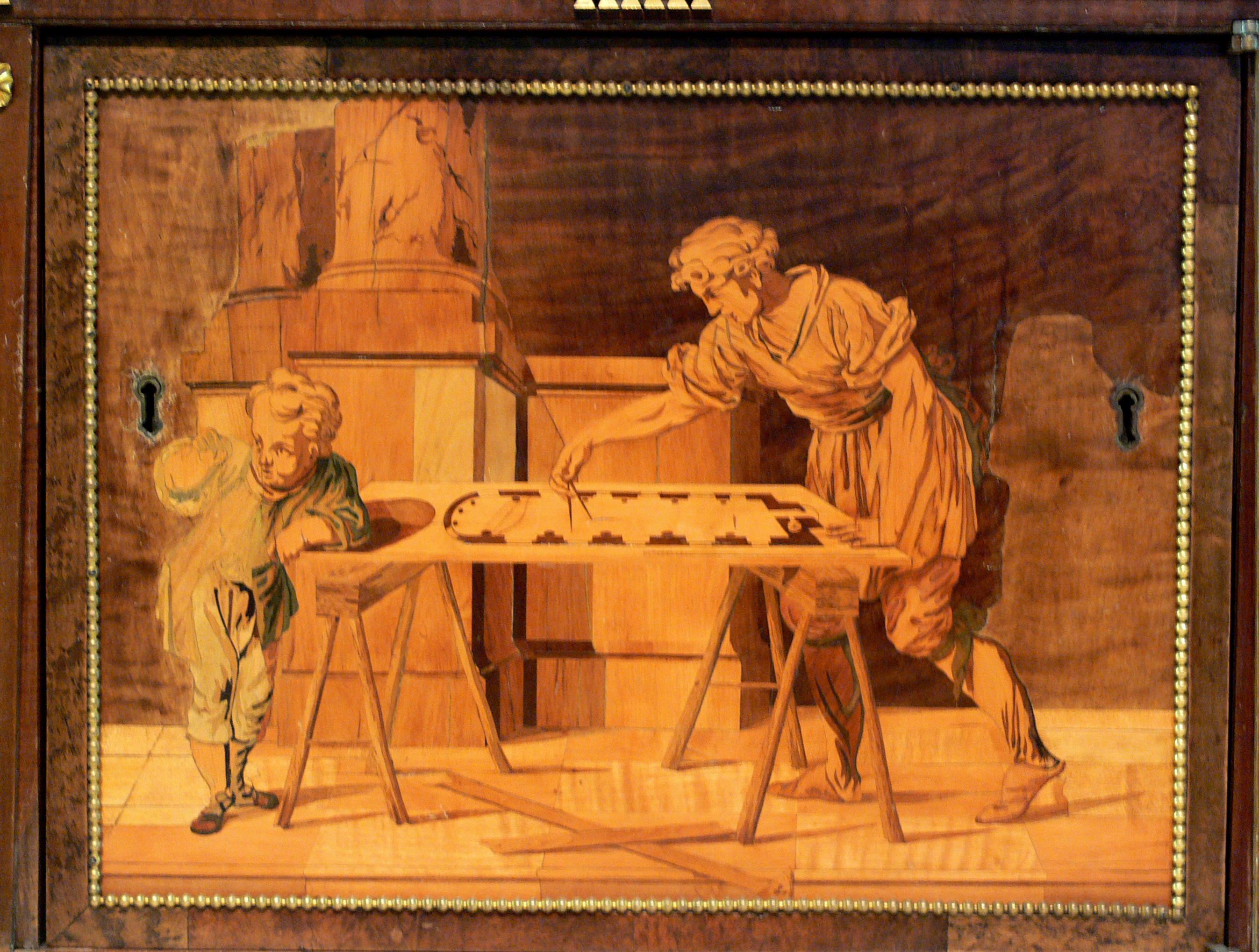 Pultschreibschrank („Neuwieder Kabinett“), aus der Werkstatt David Roentgen und Peter Kinzing, Neuwied 1779; Detail Kunstgewerbemuseum Berlin, Inv. Nr. O-1962,24